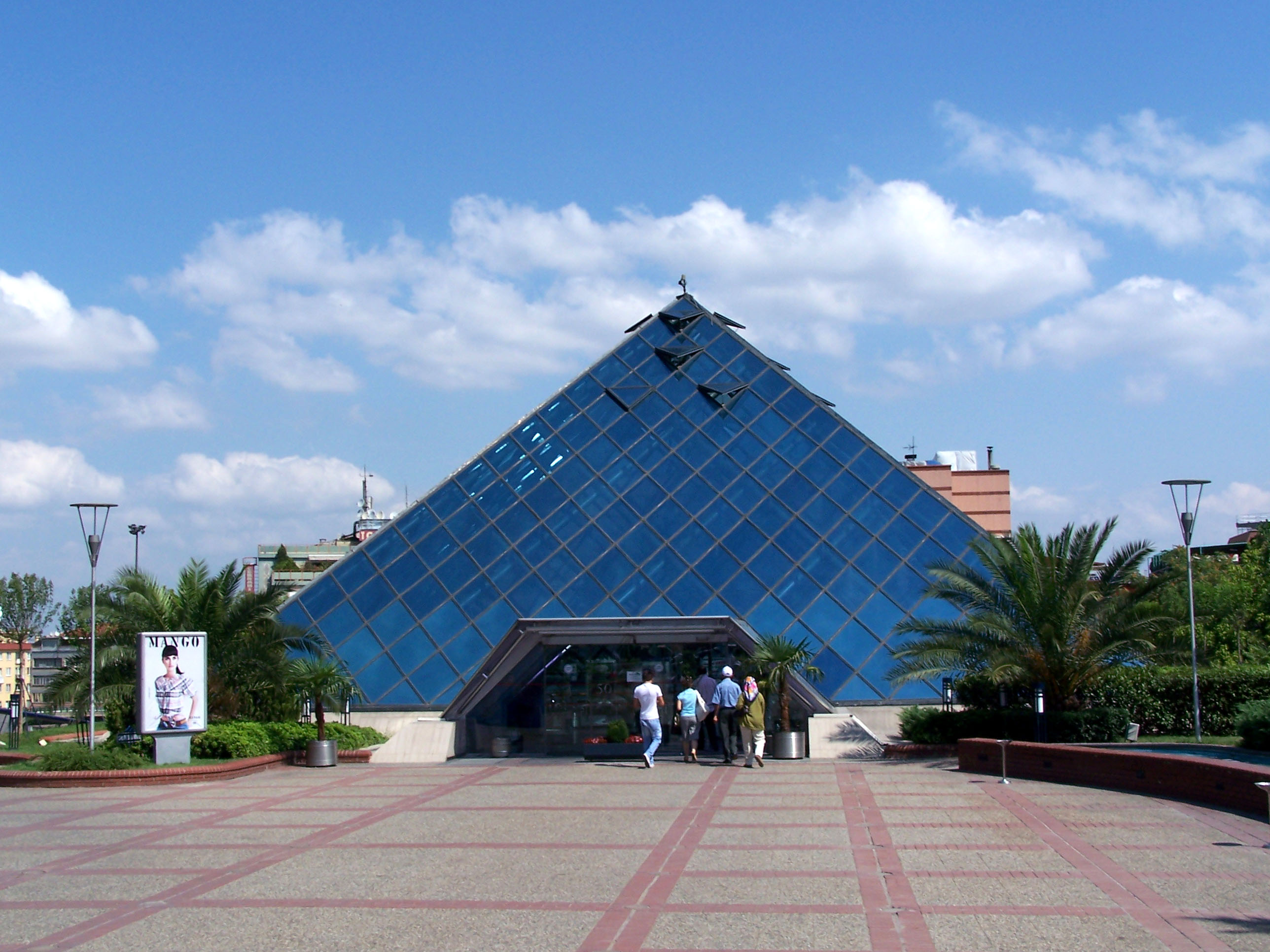 Zafer Plaza Alışveriş Merkezi in Bursa, Turkey